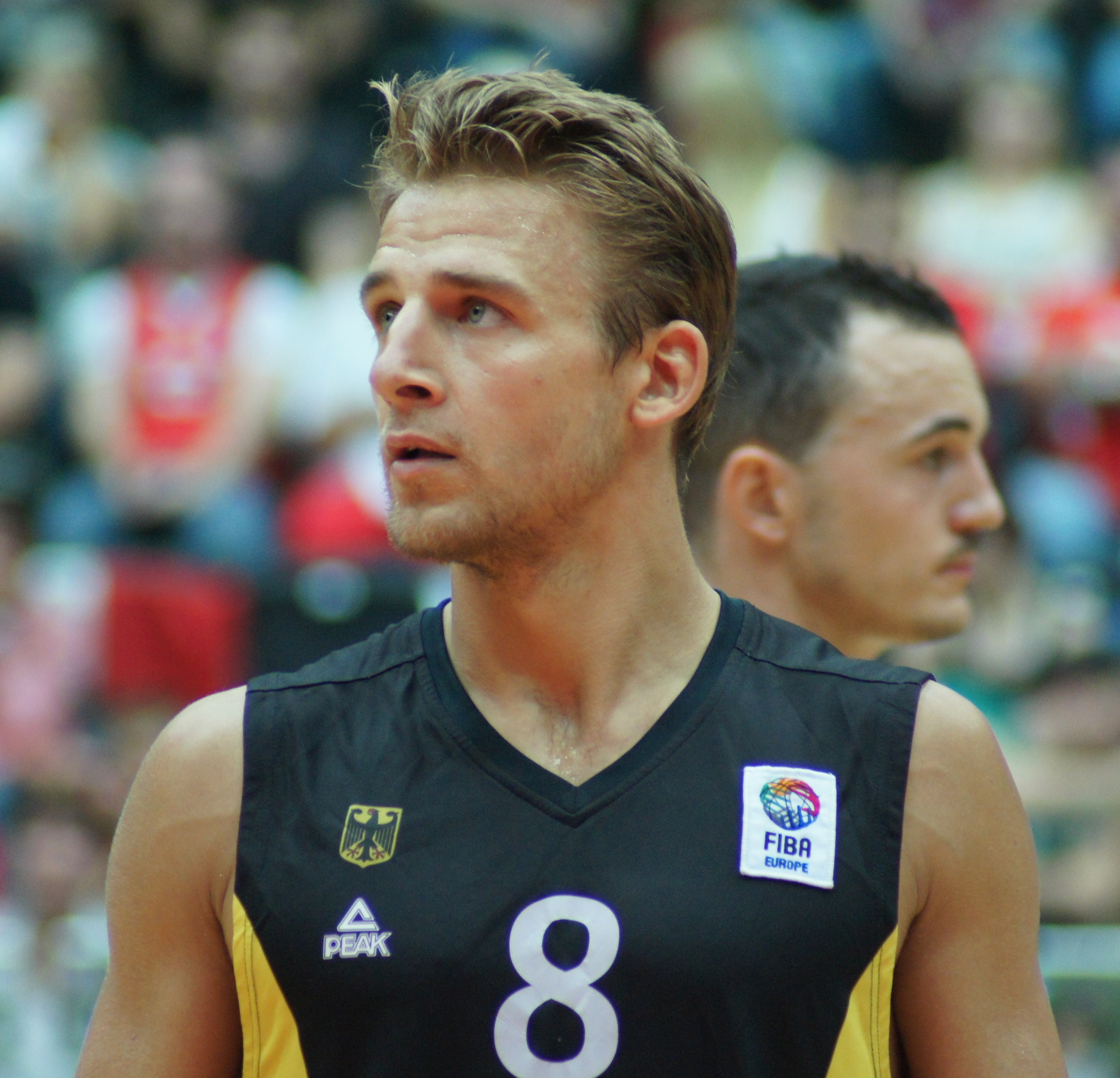 Qualifikationsspiel EuroBasket Österreich - Deutschland, 13. August 2014 im Multiversum Schwechat.